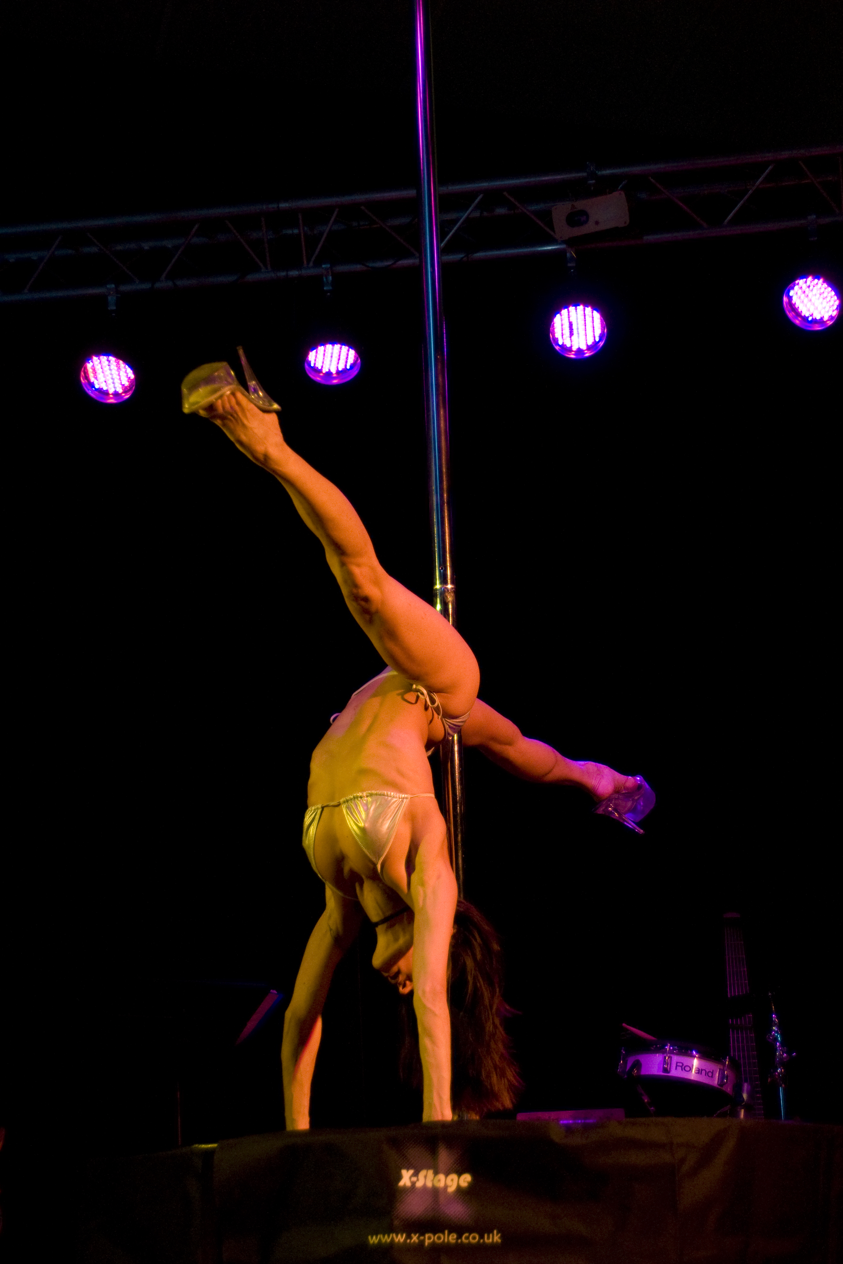 professeur de danse "jazz et pole dance"